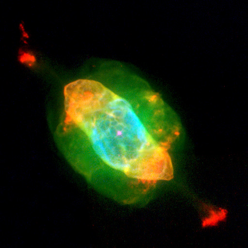 Saturn Nebula (NGC 7009).